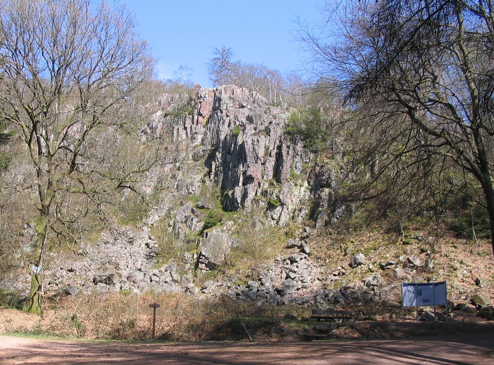 „Mannfelsen“ aus Taunusquarzit am Ringwall von Otzenhausen („Hunnenring“) bei Otzenhausen